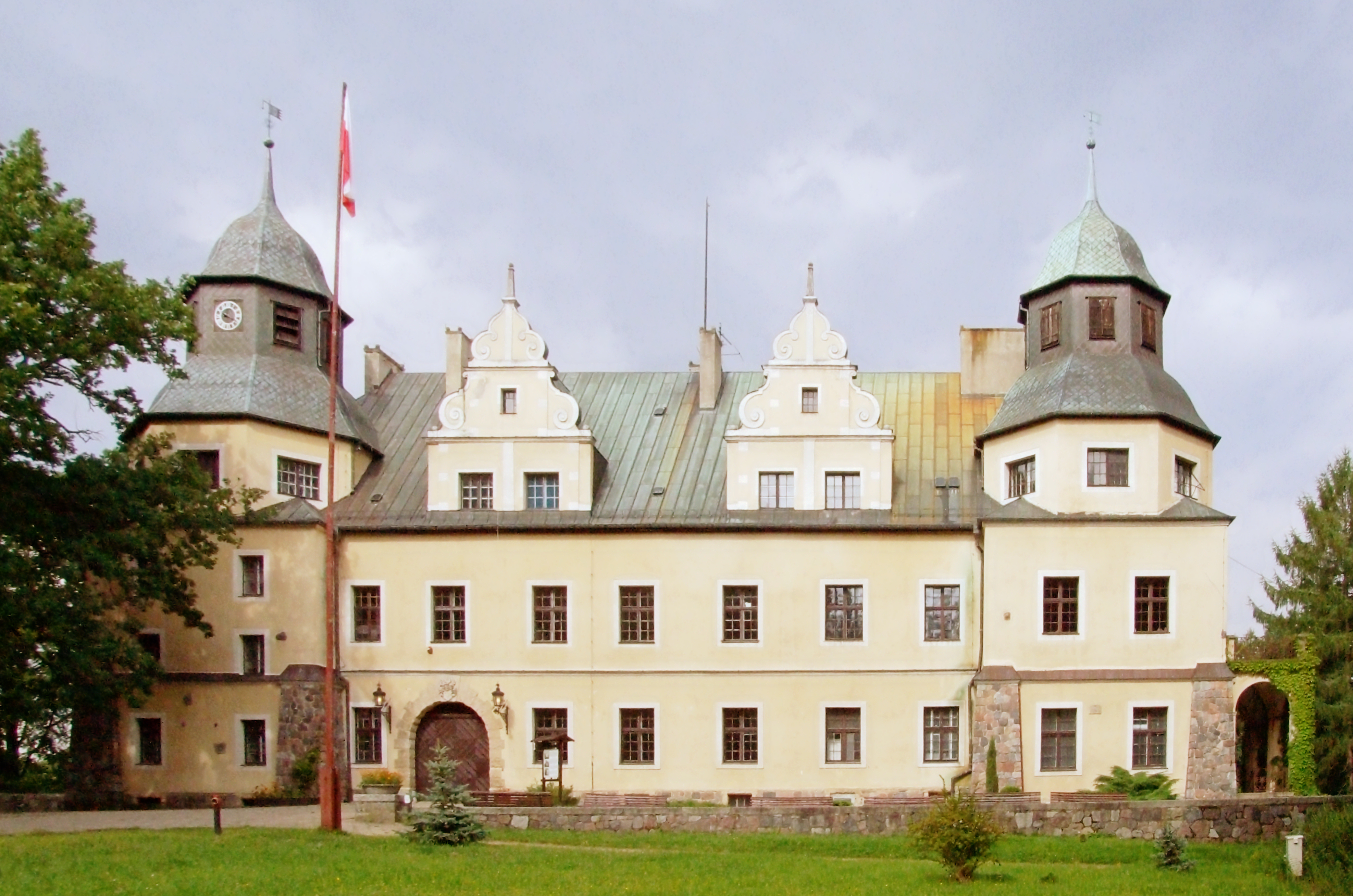 Goraj; pałac